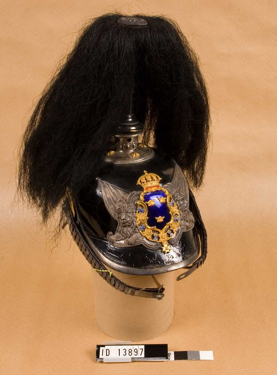 Hjälm m/1885 för officer vid trängen med tillhörande plym m/1885. Armémuseums identifikationsnr: AM.116673